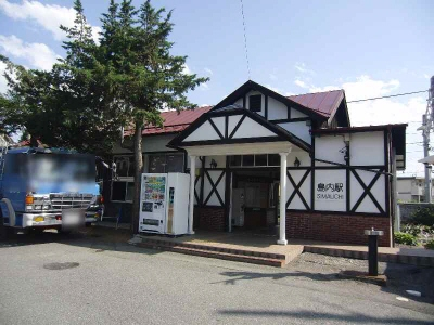 JR東日本の大糸線島内駅の駅舎です。